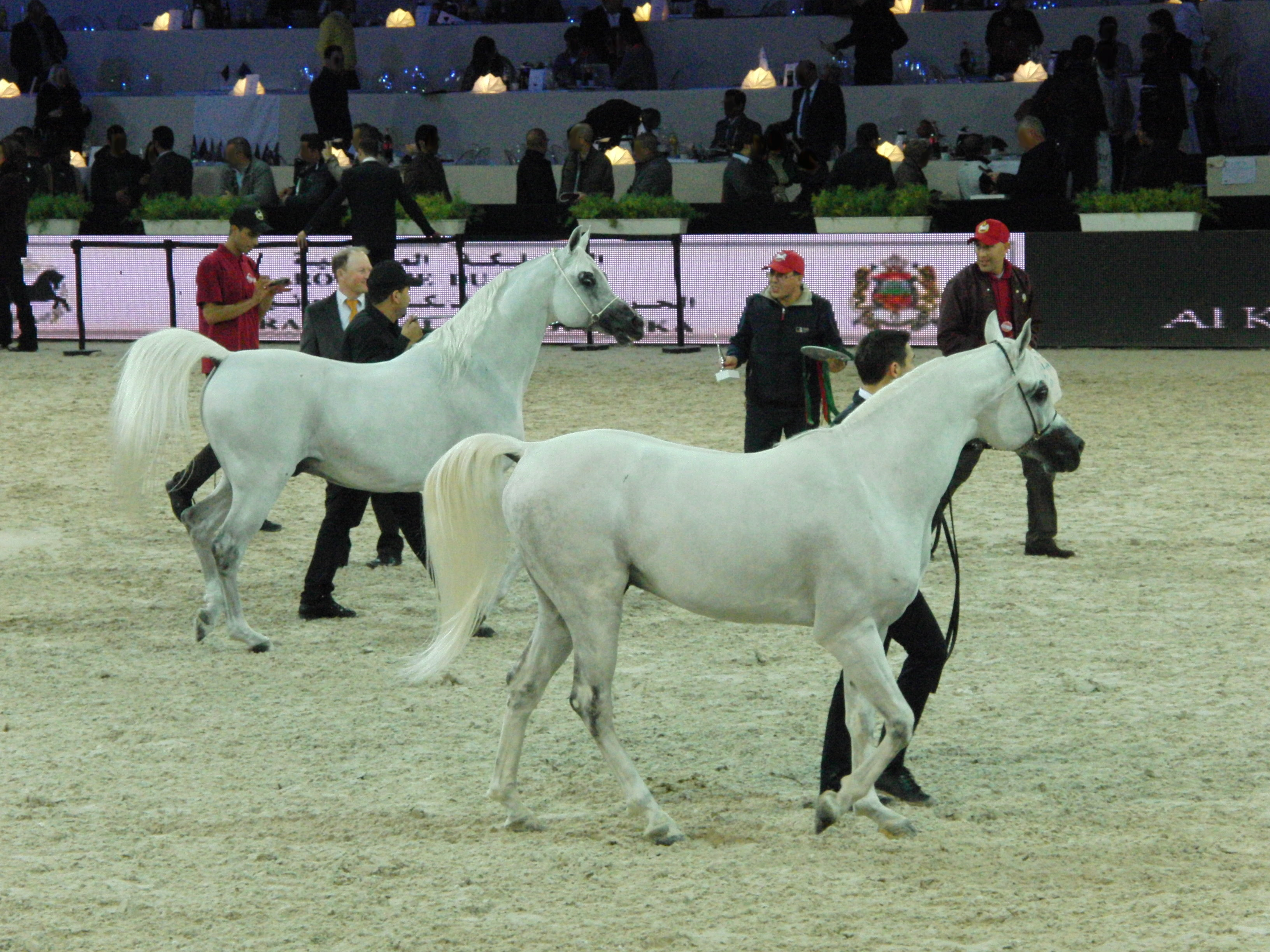 Championnat du Monde du Cheval Arabe, Salon du cheval d'Eljadida (maroc) 2014